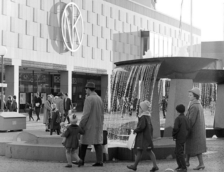 Farsta centrum med NK-varuhuset och fontänskulptur